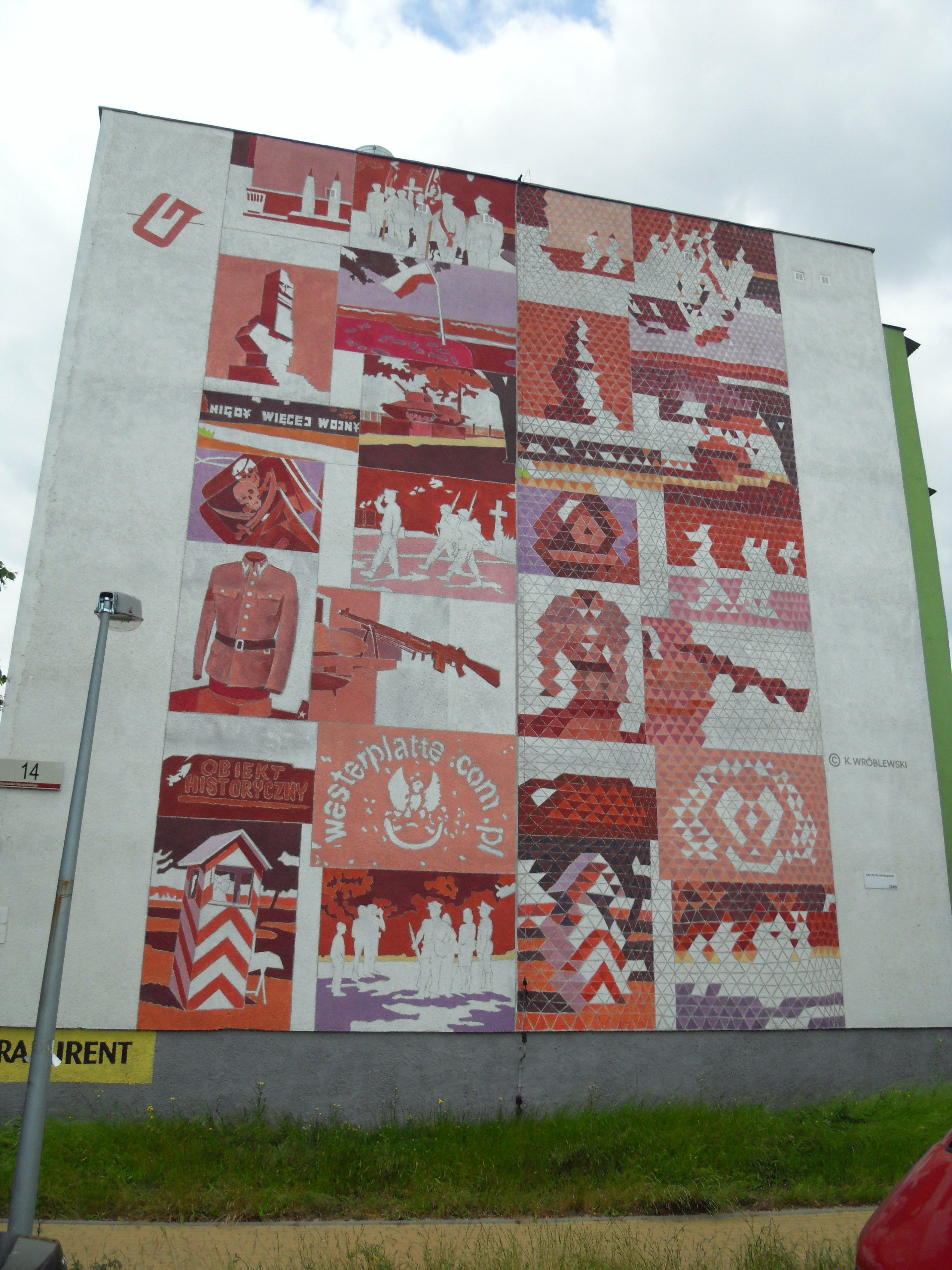 Gdańsk Zaspa Młyniec, ul. Skarżyńskiego 14, mural, autor: Krzysztof Wróblewski.